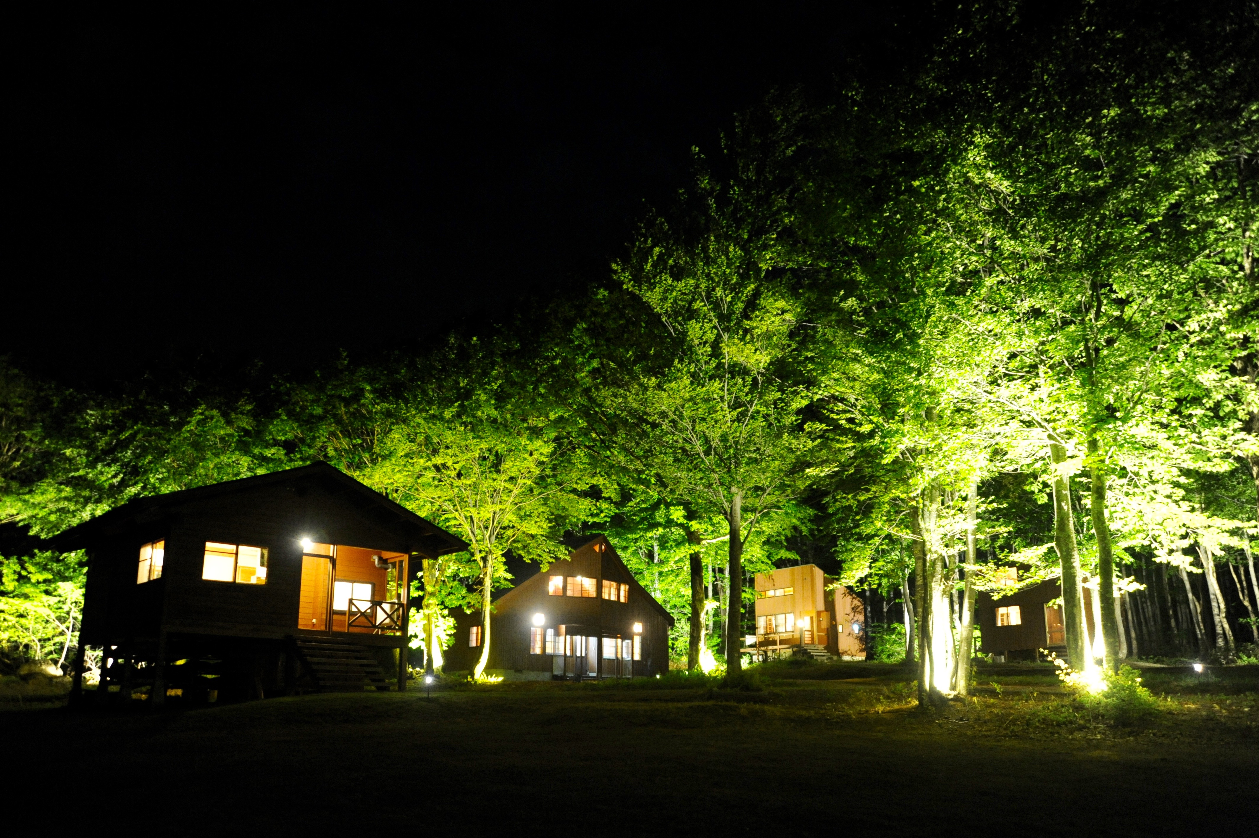 ポレポレの夜景